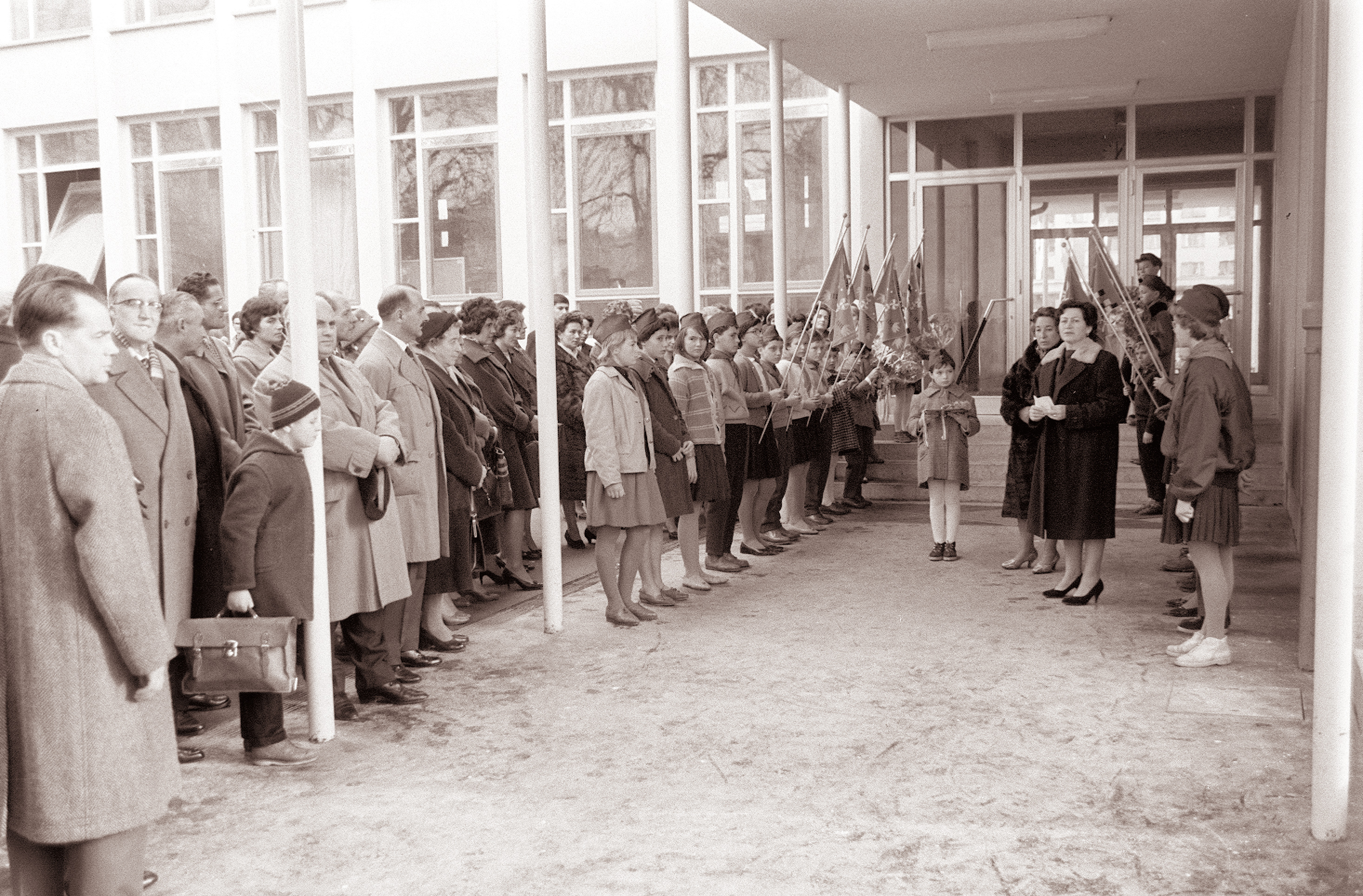 Odprtje osnovne šole Franc Rozman-Stane na Kersnikovi ulici v Mariboru